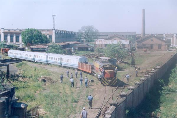 Vista panorámica de los Talleres Ferroviarios de Tafí Viejo, Tucumán Argentina, al ingreso del Tren Hospital Pediátrico de la Fundación Alma (Asoc. Ayuda al niño Enfermo ) Noviembre de 2003 - Foto de Ariel Espinoza.